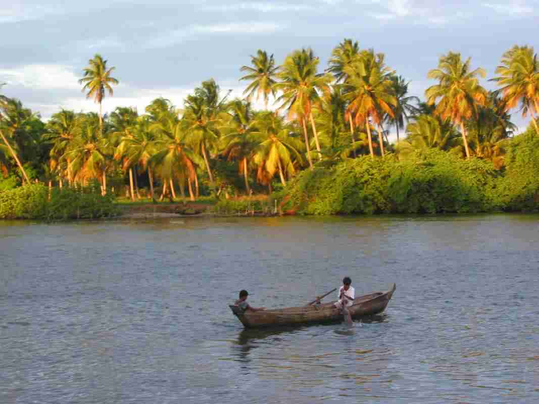 Lagune Mundaú, Alagoas, Brasilien